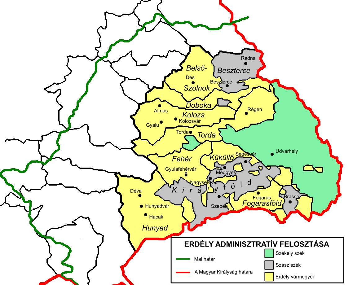 Erdély adminisztratív felosztása